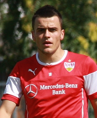 Filip Kostic beim VfB-Training. Aufgenommen von